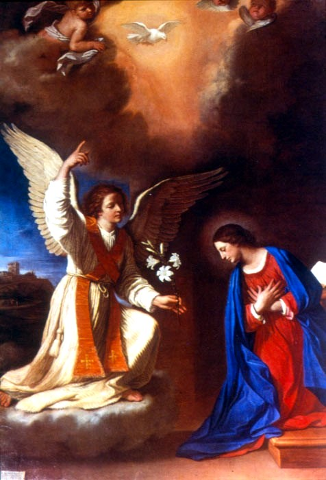 Dipinto Annunciazione, del Guercino, situato nella Chiesa di San Domenico di Ancona